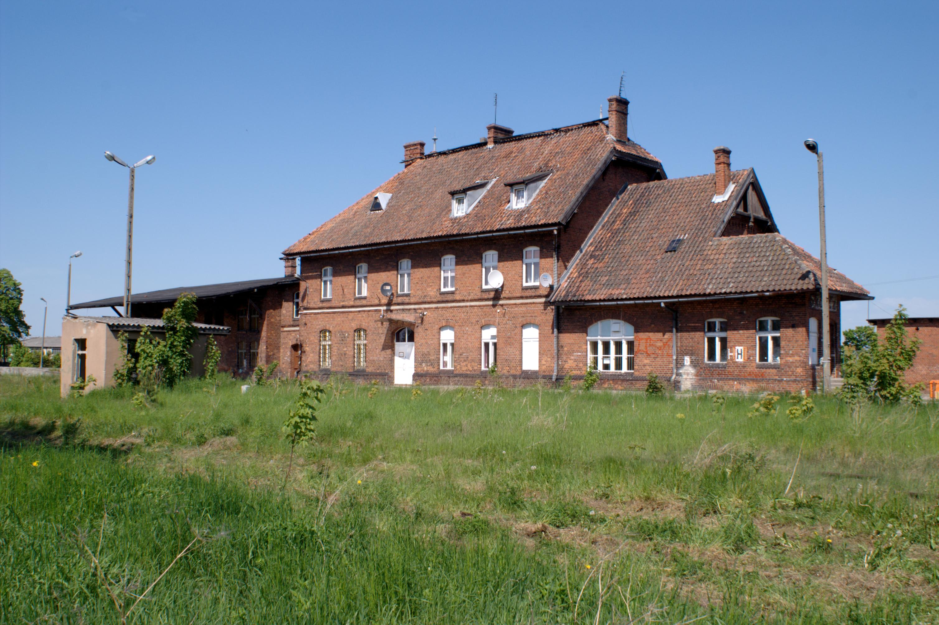 Budynek dworca